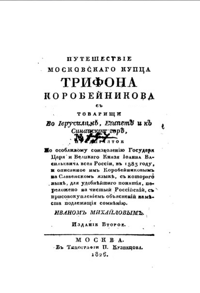 Титульный лист «Хожения» Трифона Коробейникова издания 1826 года.